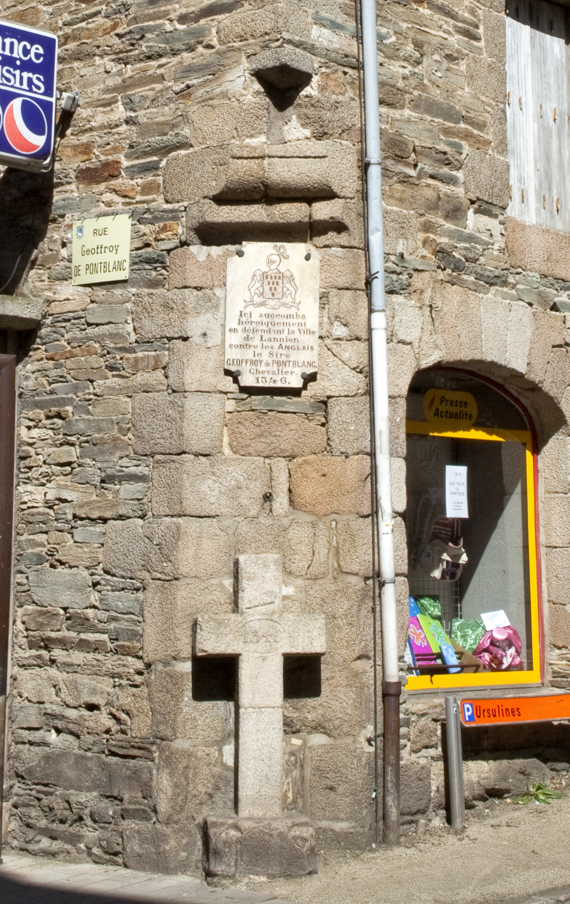 Plaque commémorative de la mort du chevalier de Pontblanc.